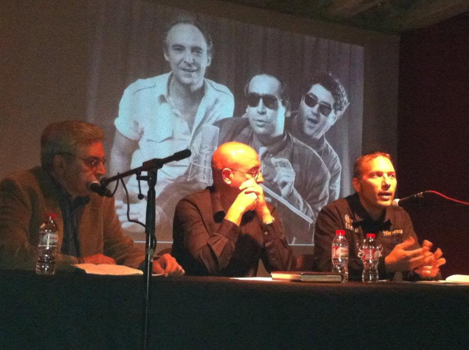 Homenatge al periodista Ramon Barnils organitzat pel Col·lectiu Desvalls de Manresa organitza, amb el suport d’Òmnium Bages, el 20 d'octubre de 2011, sota el títol "10 anys sense Ramon Barnils". Lluís Calderer (escriptor i activista cultural), Joan Manuel Tresserras (professor UAB) i David Bassa (president del GPRB), al Restaurant Vermell de Manresa.